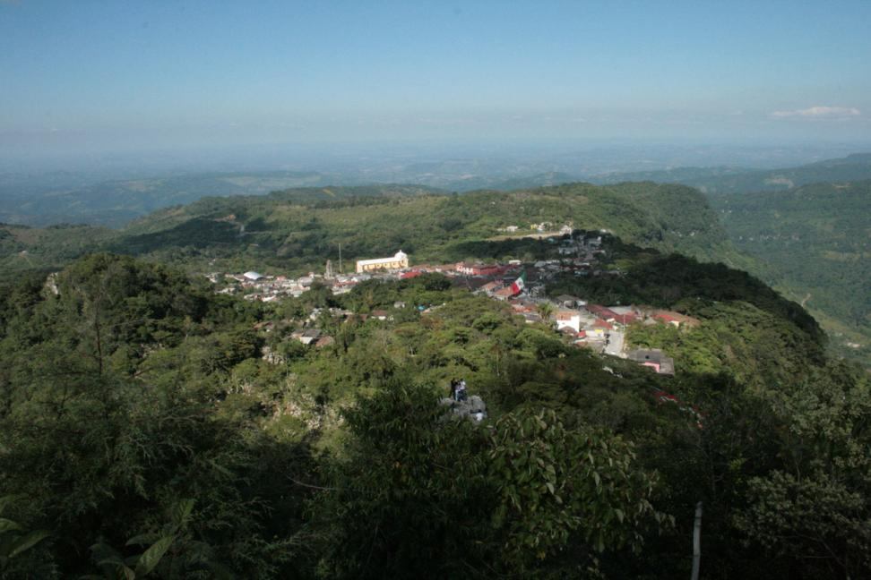 Población vieja de la Sierra Norte de Puebla